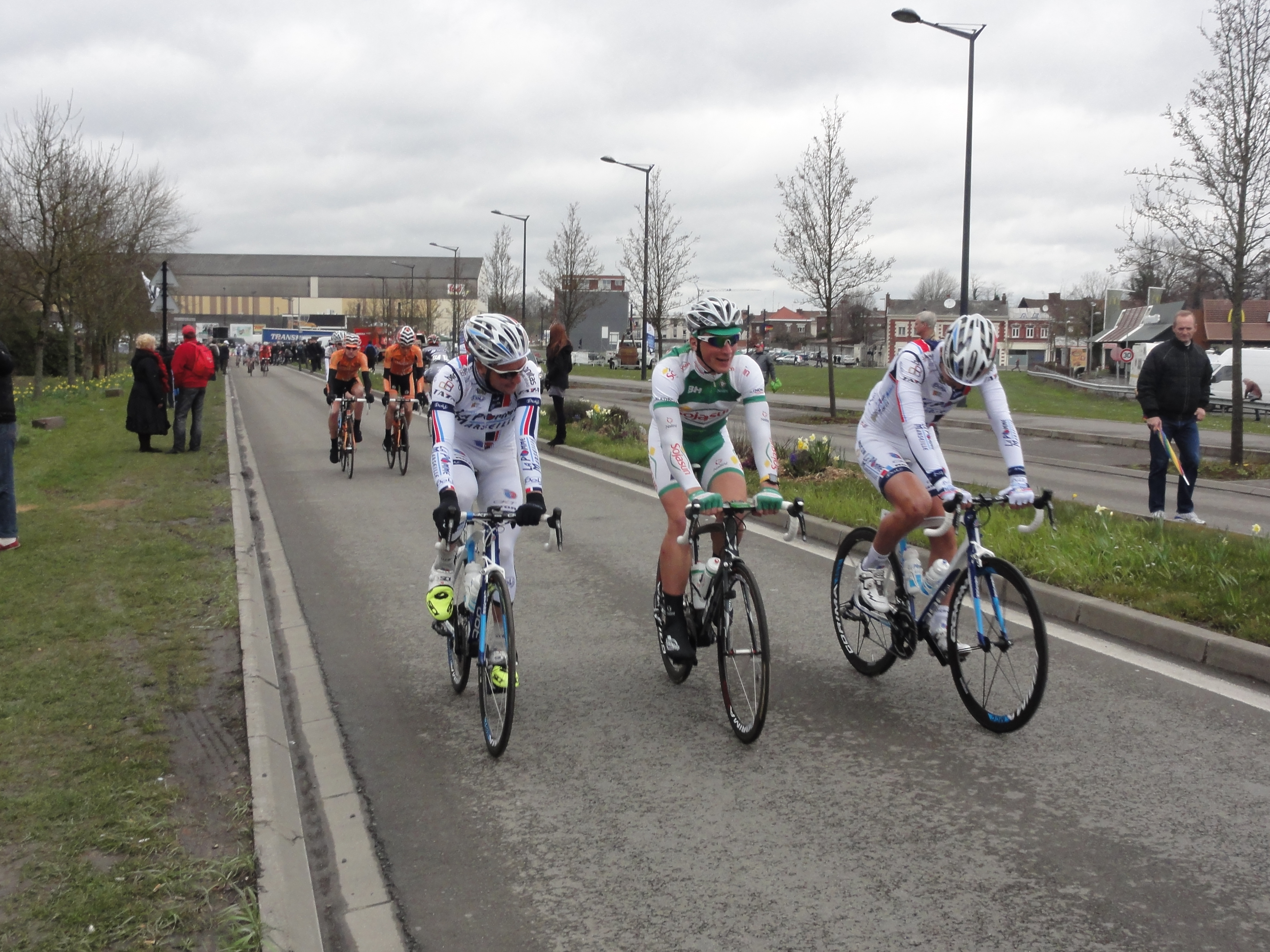 Reportage photographique réalisé le mardi 11 avril 2013 durant l'édition 2013 du Grand Prix de Denain à Denain, Nord, Nord-Pas-de-Calais, France. Depicted person: Evaldas Šiškevičius